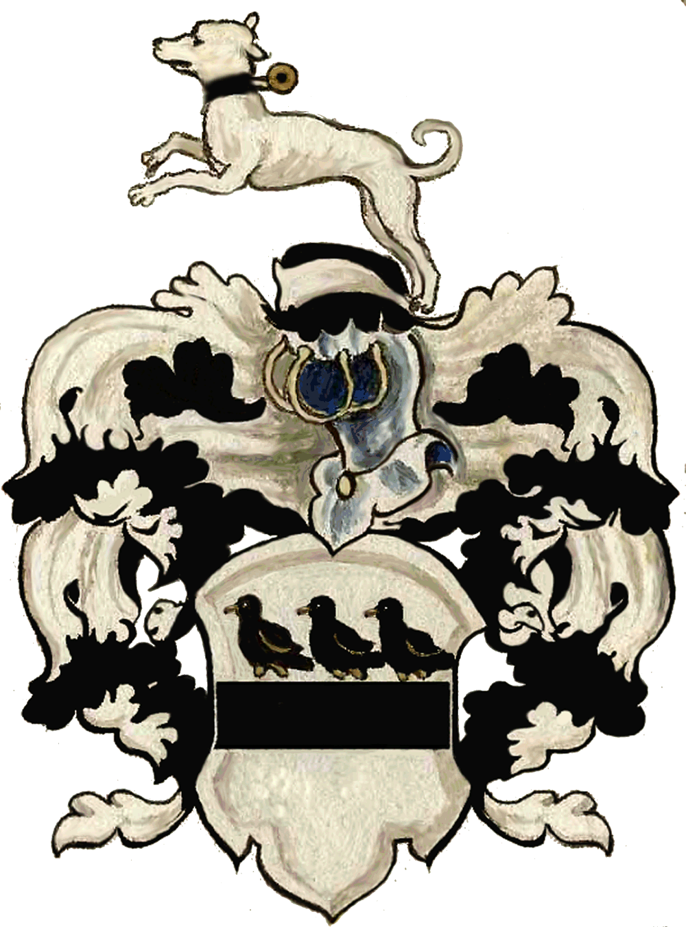 Vollwappen von Johannes Ernst von Reuschenberg zu Setterich